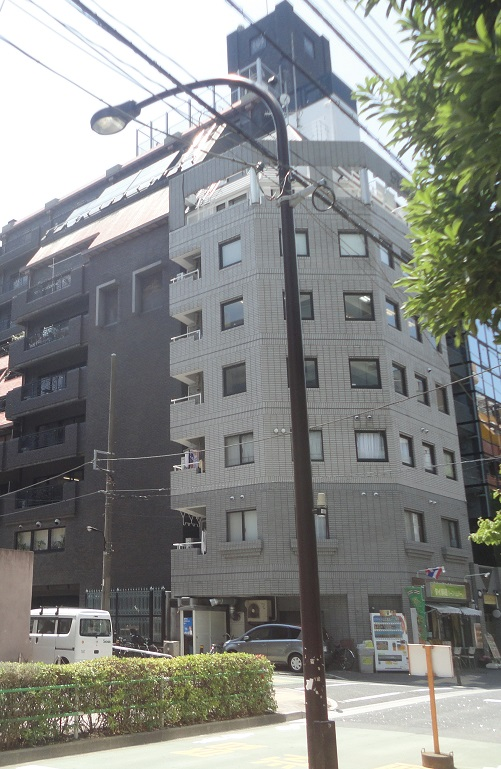 Hanazono Roomのある「サンモールクレスト」の外観。上階に撮影スタジオがある。